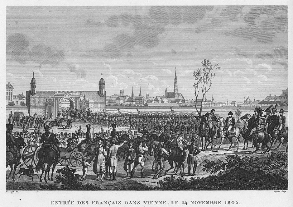 Einnahme von Wien durch die französische Armee unter Führung von Napoleon im November 1805 (Besetzung der Stadt Wien durch die Franzosen)